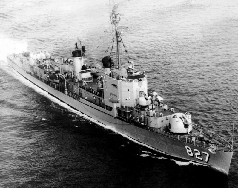 The U.S. Navy destroyer USS Robert A. Owens (DDE-827) underway.